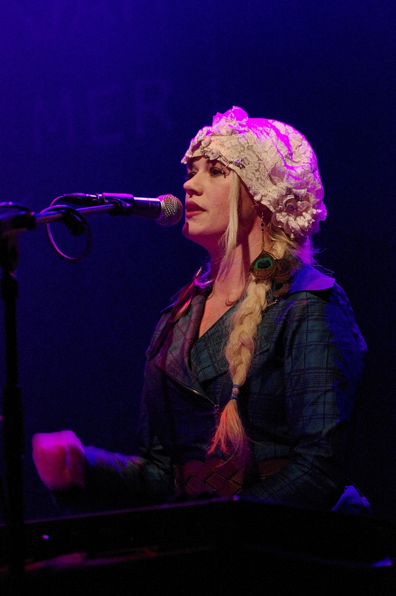 Unni Wilhelmsen, norwegian singer, live at metropool Hengelo, NL